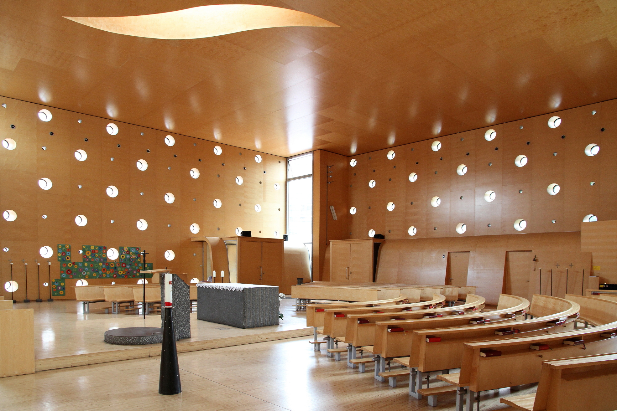 Innenansicht der Donaucitykirche im Wiener Bezirk Donaustadt (22. Bezirk), die nach den Plänen von Heinz Tesar in den Jahren 1999/2000 errichtet wurde.